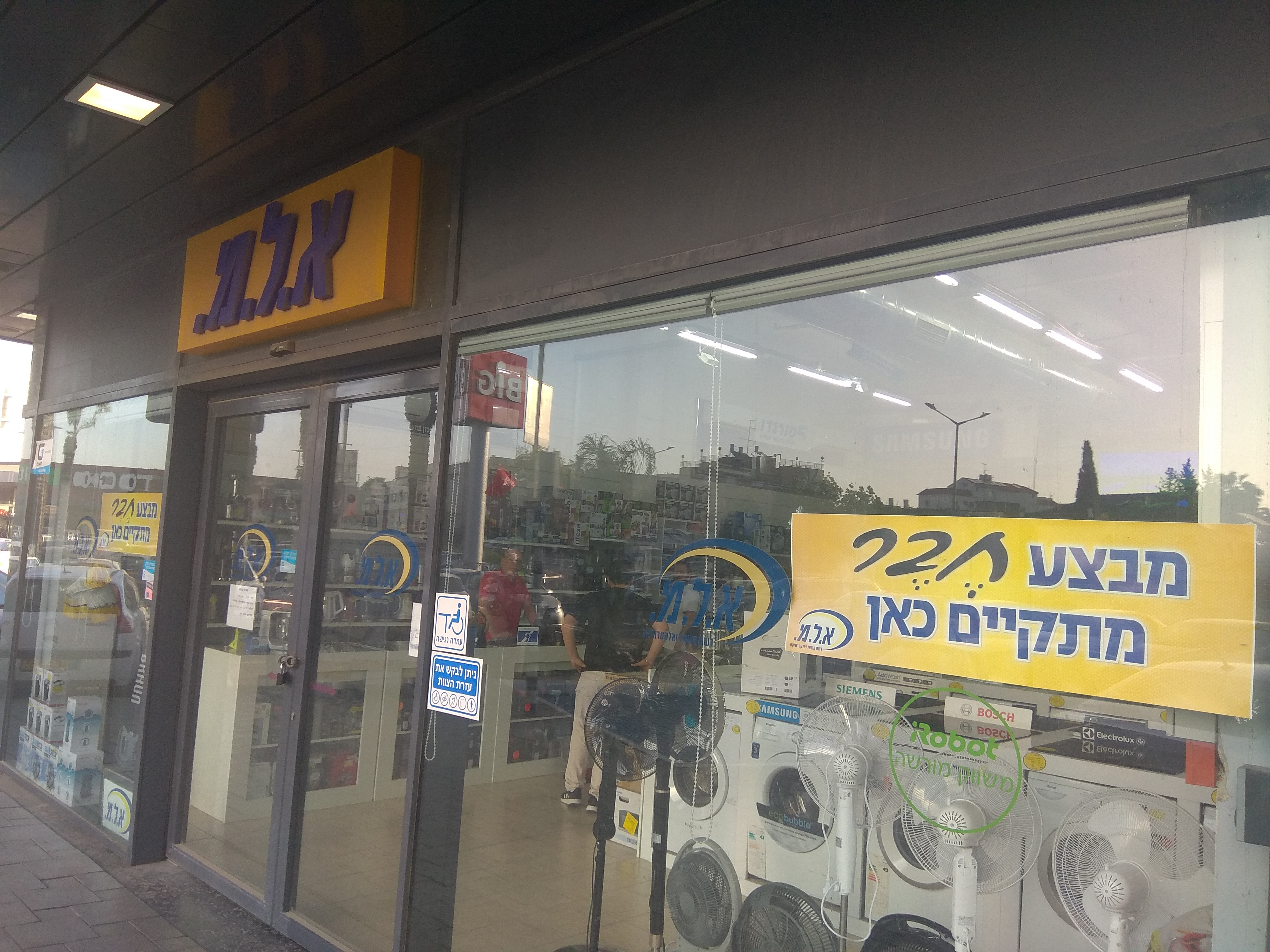 סניף הרשת